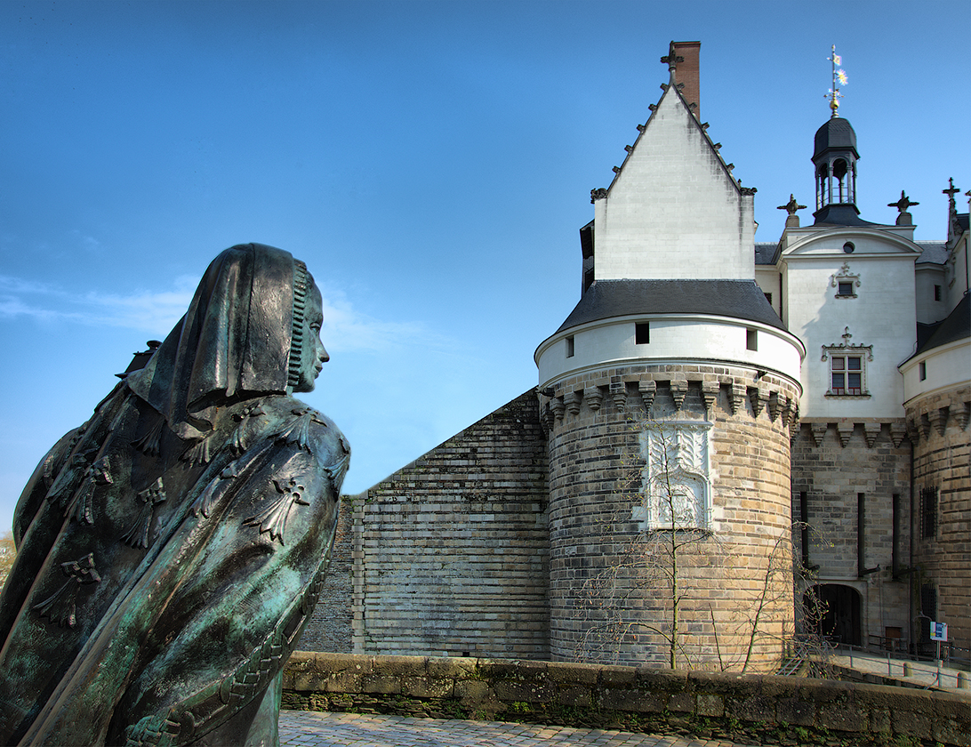 4 Place Marc Elder à Nantes